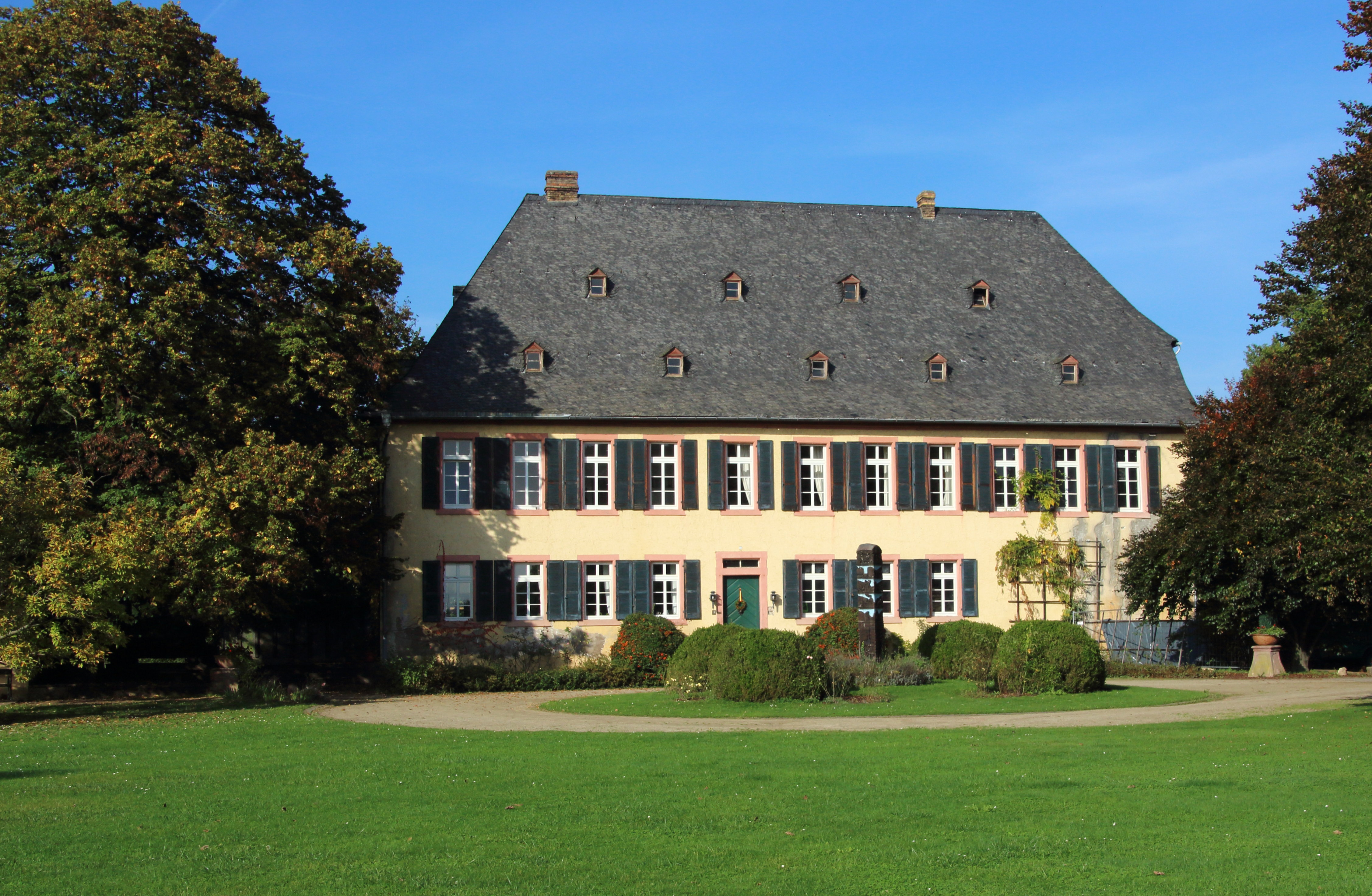 Draiser Hof. Ehemalige Grangie des Klosters Eberbach. Heute Weingut Baron Knyphausen. Eltville am Rhein.